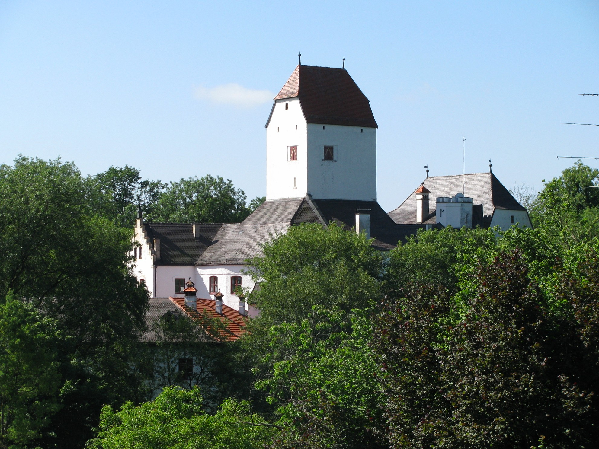 Burg Elkofen, Ansicht der Anlage aus nördlicher Richtung